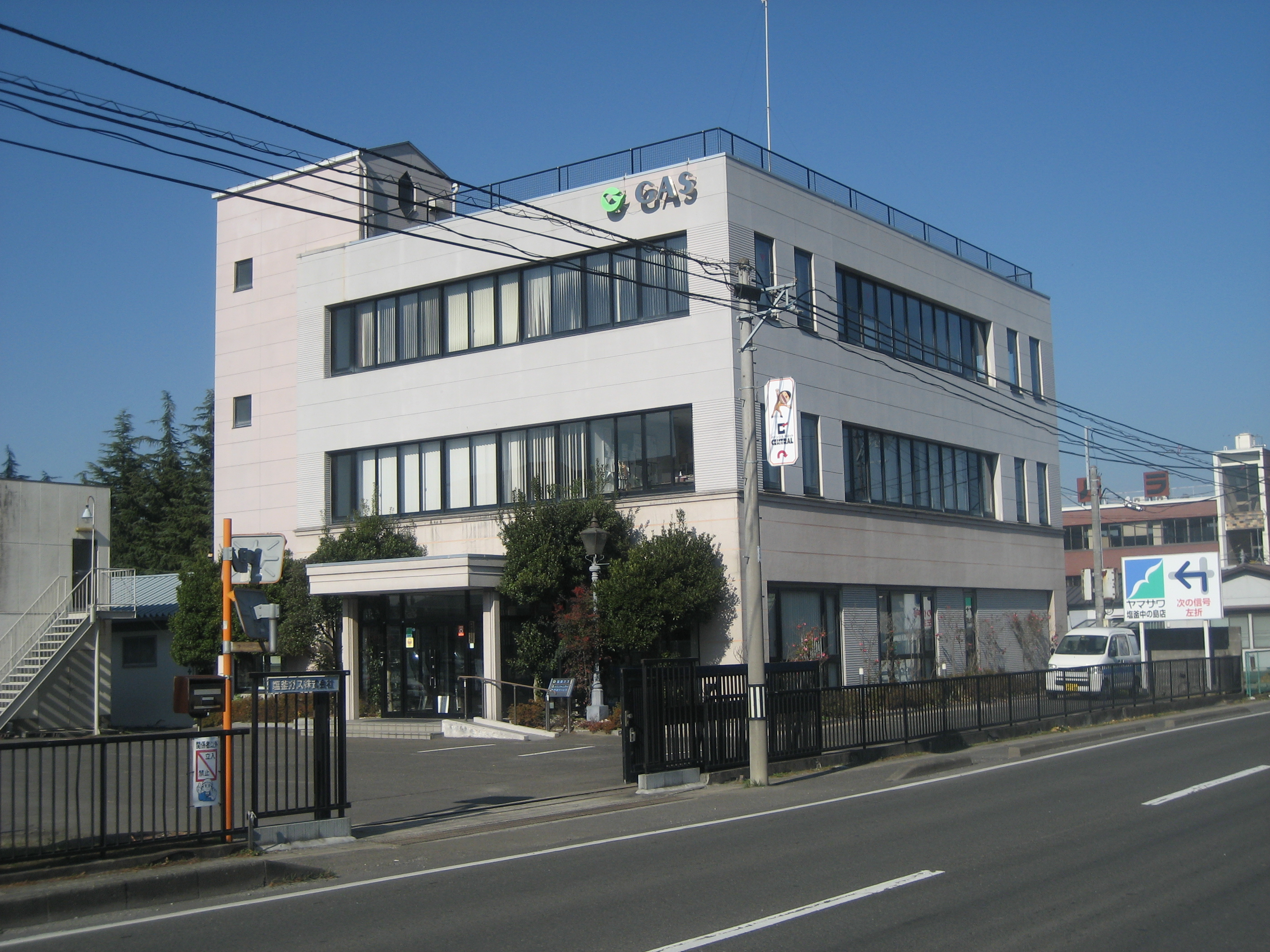 塩釜ガス本社社屋